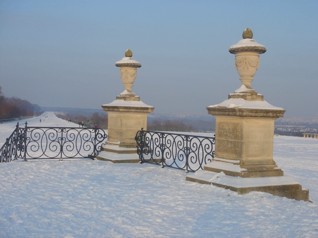 Parc du château de Saint-Germain en Laye, vue de la terrasse en enfilade sous la neige.